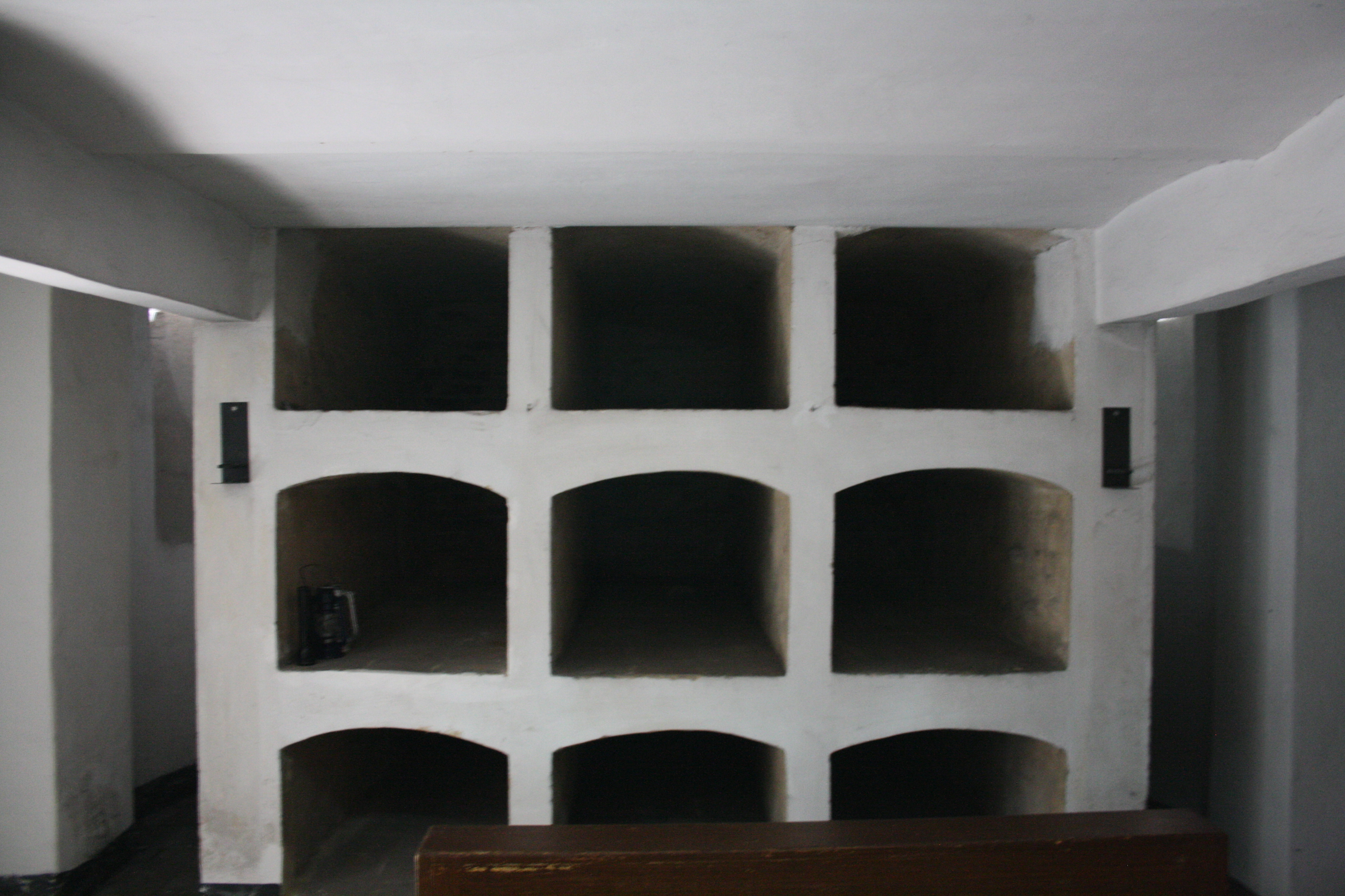 Negen lege tombes in de bisschoppelijke grafkapel in Roermond.